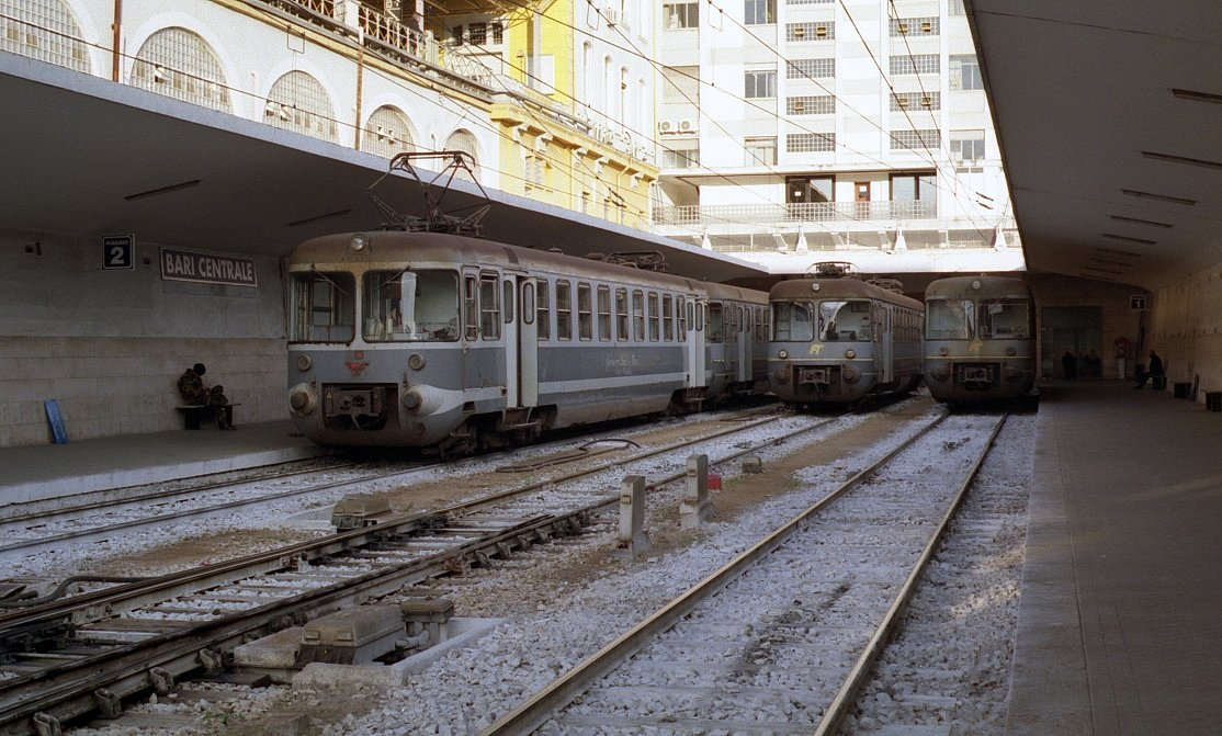 Elettromotrici in sosta alla stazione di Bari Centrale della società Ferrotranviaria (FT)